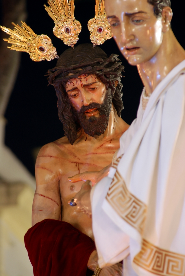 Fotografía de medio torso de Nuestro Padre Jesús del Ecce-Homo mostrándose de pie, con el torso desnudo, maniatado, azotado, coronado de espinas, cabeza gacha y ligeramente ladeada, mirada baja, expresión resignada. En primer término aparece la figura auxiliar de Poncio Pilato.